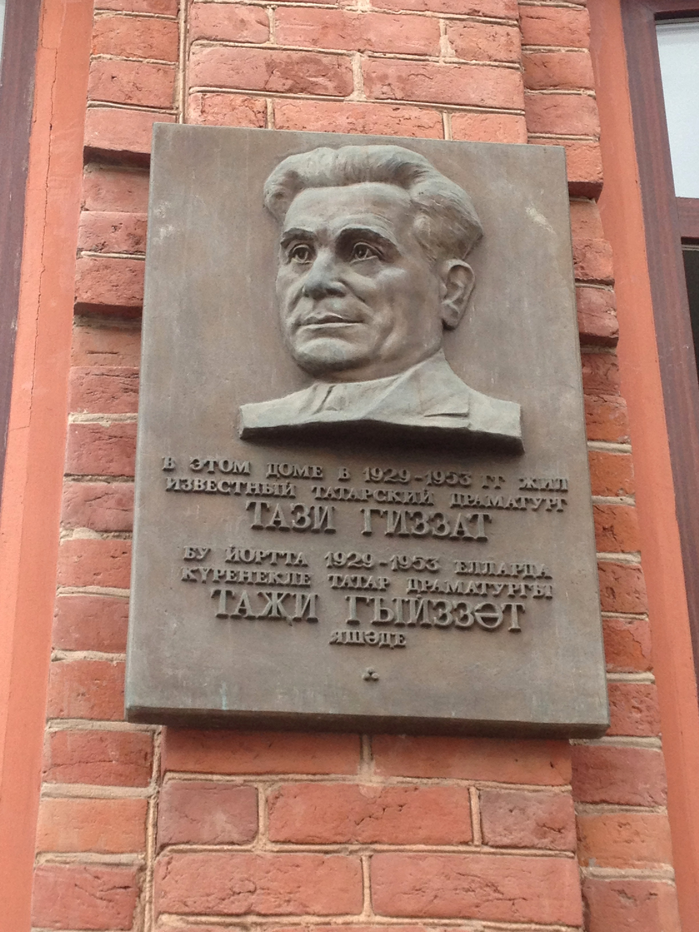 Дом, в котором жил заслуженный деятель искусств ТаССР Тази Гиззат: улица Островского, 4, Казань, Татарстан